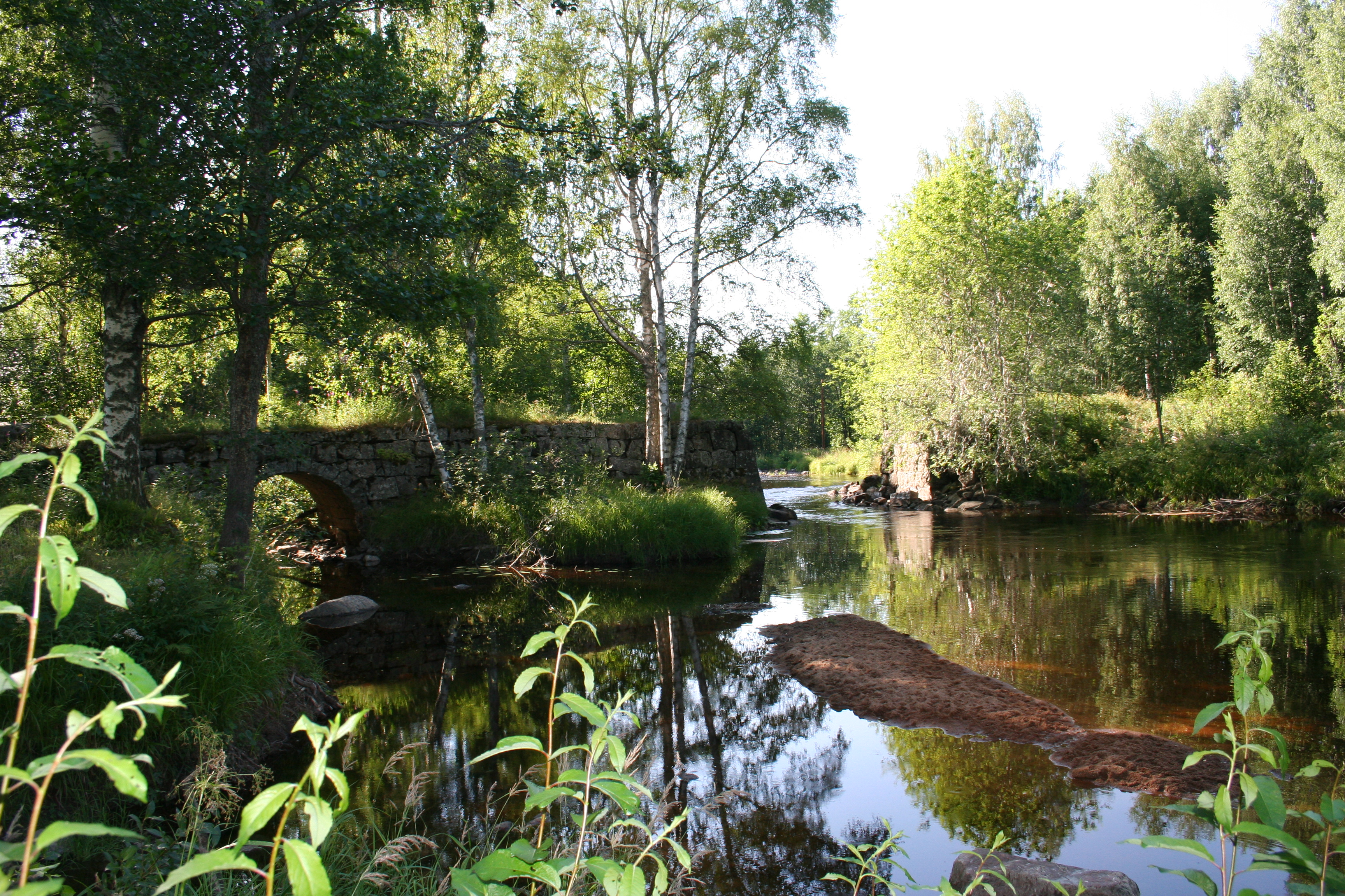 Parti av Rösteån, nära utloppet i Ljusnan - i byn Röste, i Bollnäs kommun. Bilden är från sommartorkan 2006 då vattenståndet var lägre än normalt.